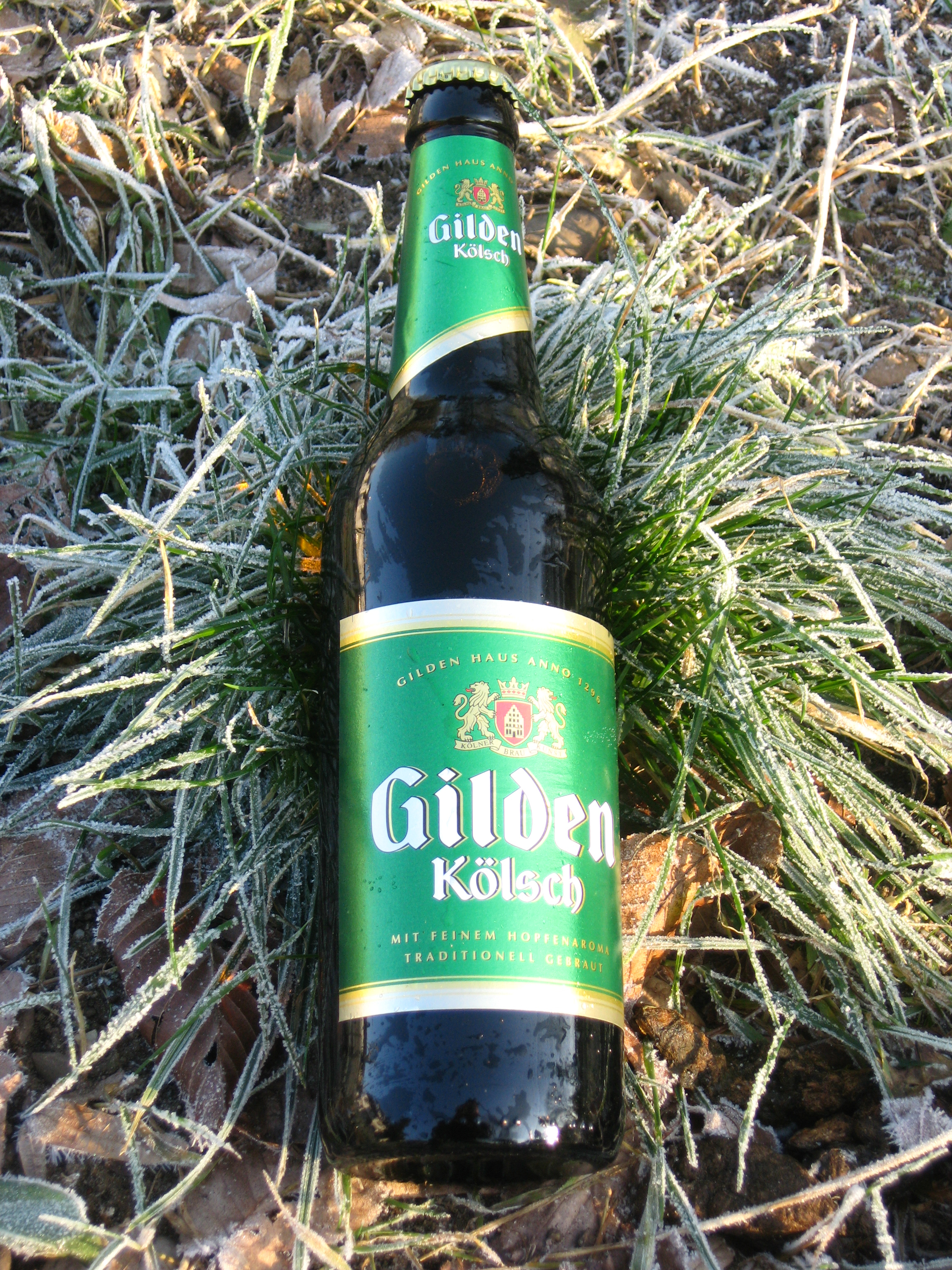 Flasche Gilden Kölsch (0,5 l) Datum: 29.01.2011 Urheber: B. Neulich alias Benutzer:Neulich im Roxy Kino Quelle: privates Fotoarchiv des Urhebers